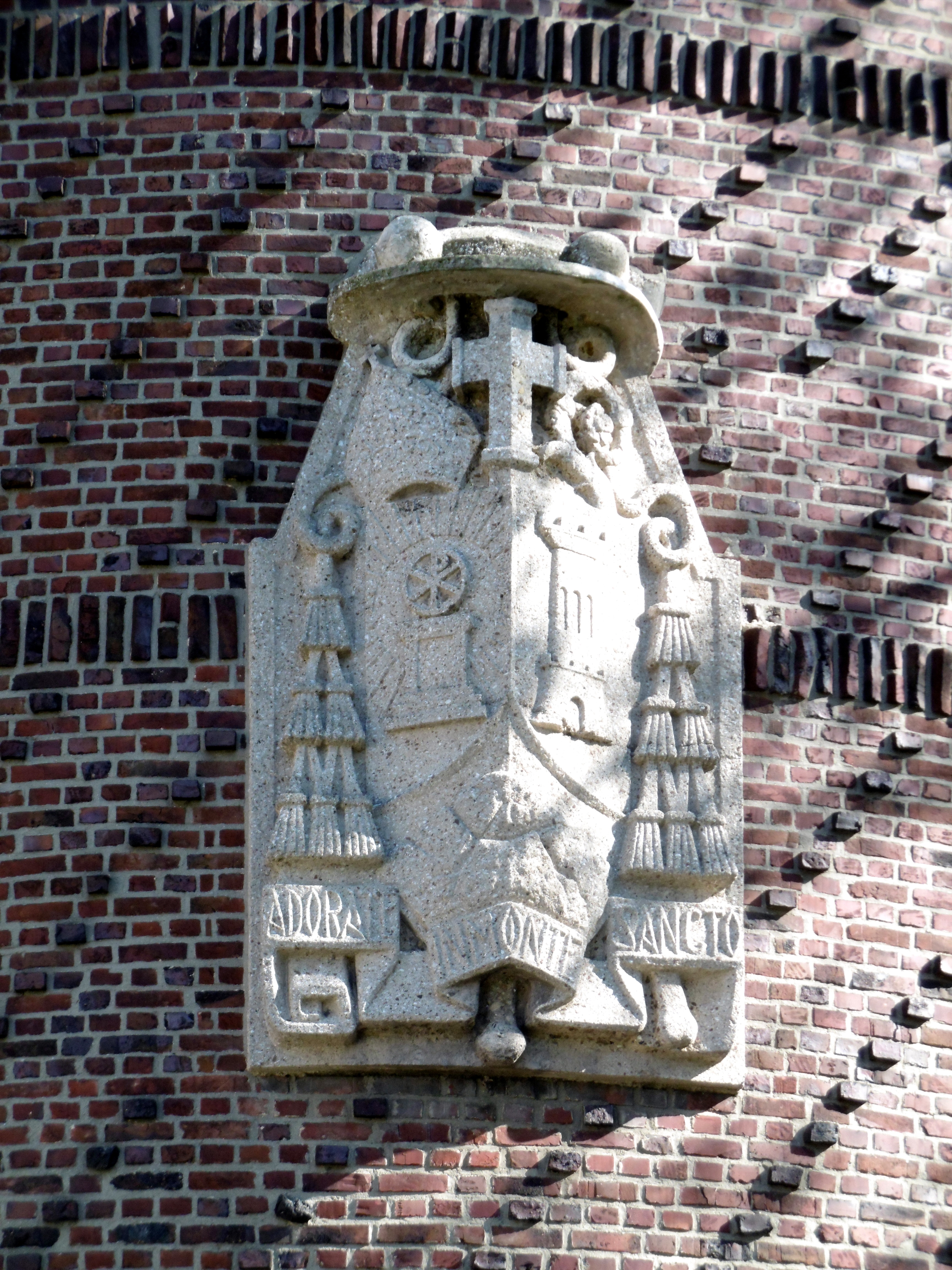 Wappen am Westturm der Benedictusabtei Vaals-Mamelis